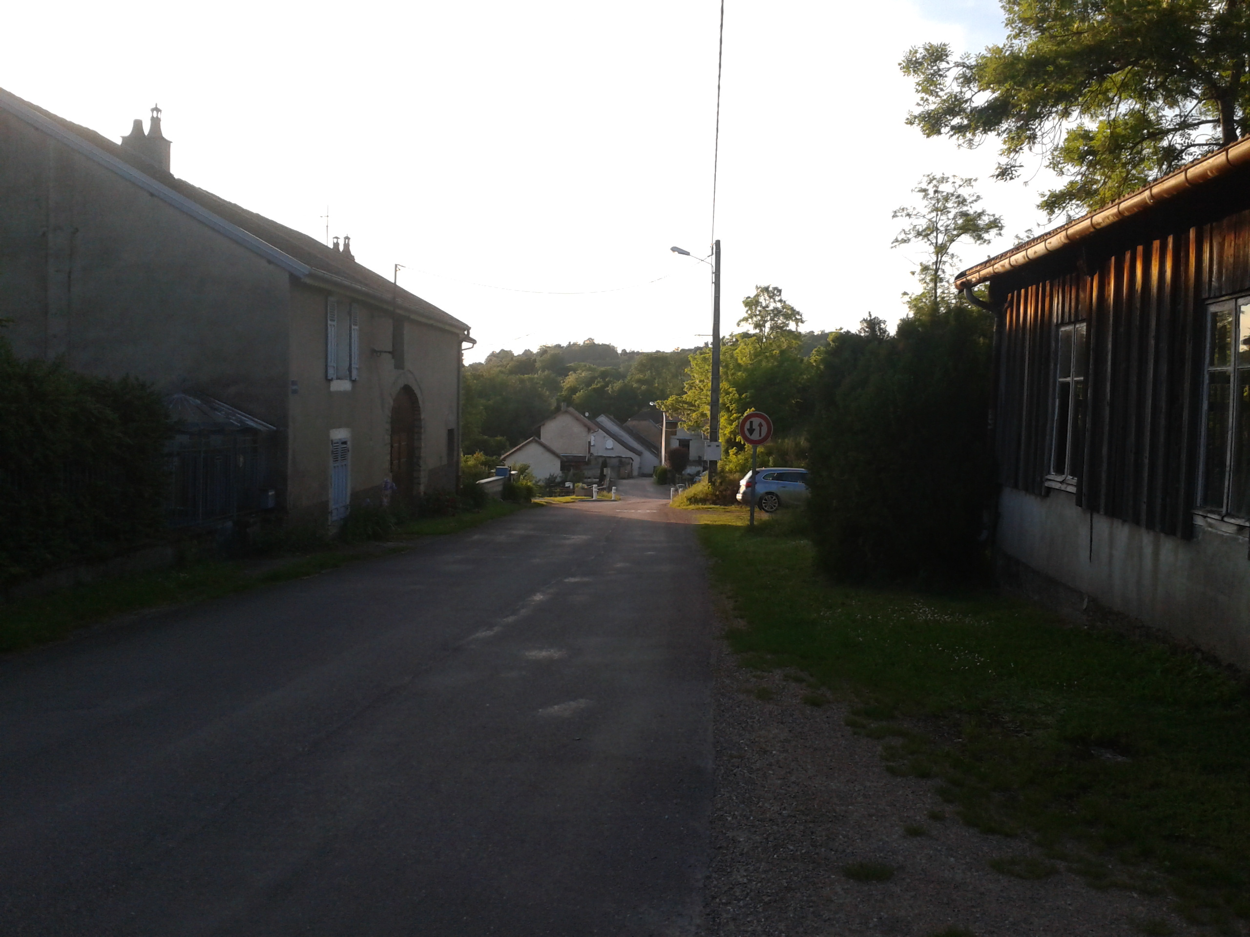 La commune de Coulevon